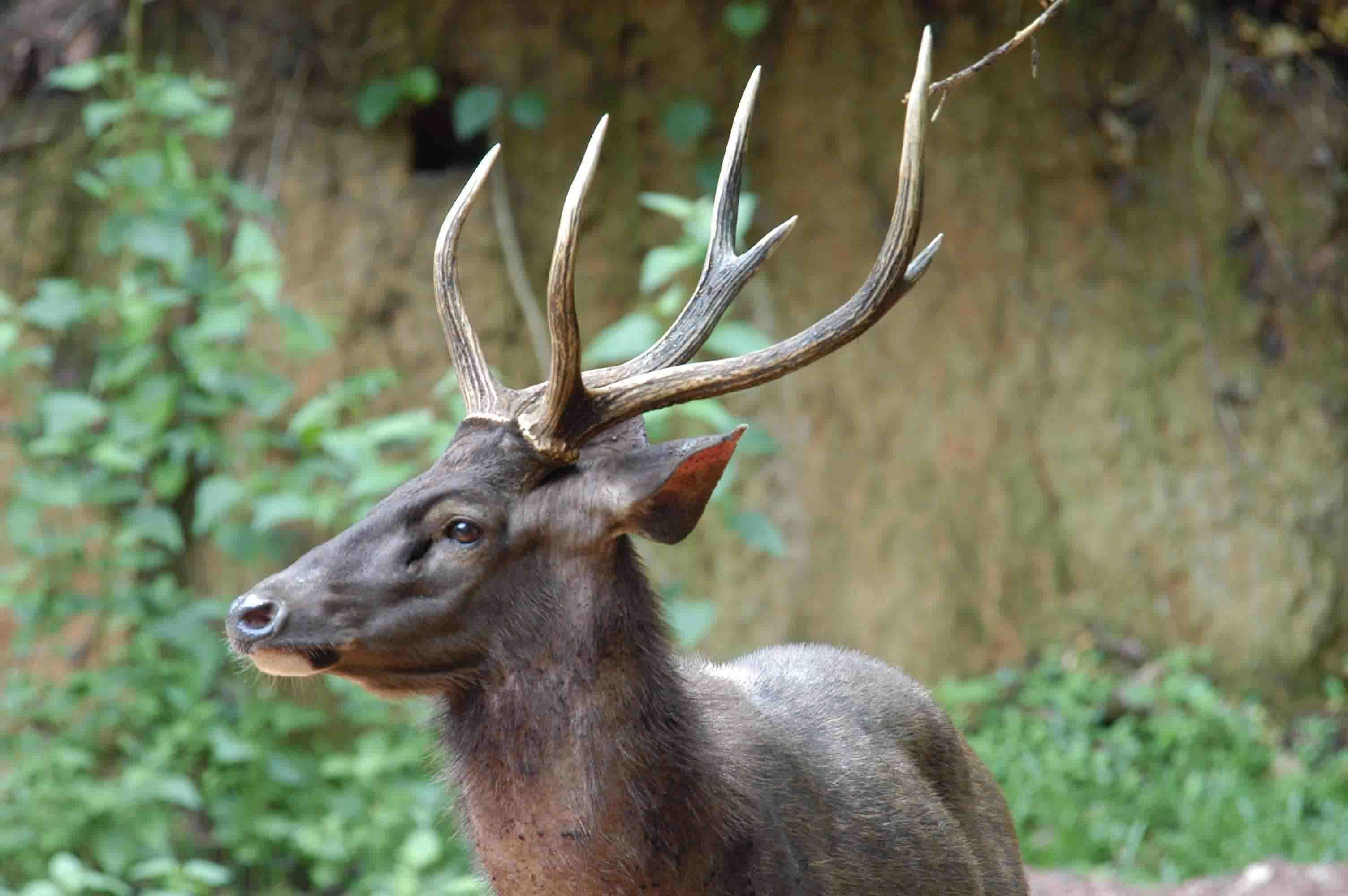 Cerf sambar mâle en liberté, Khao Yai, Thaïlande.